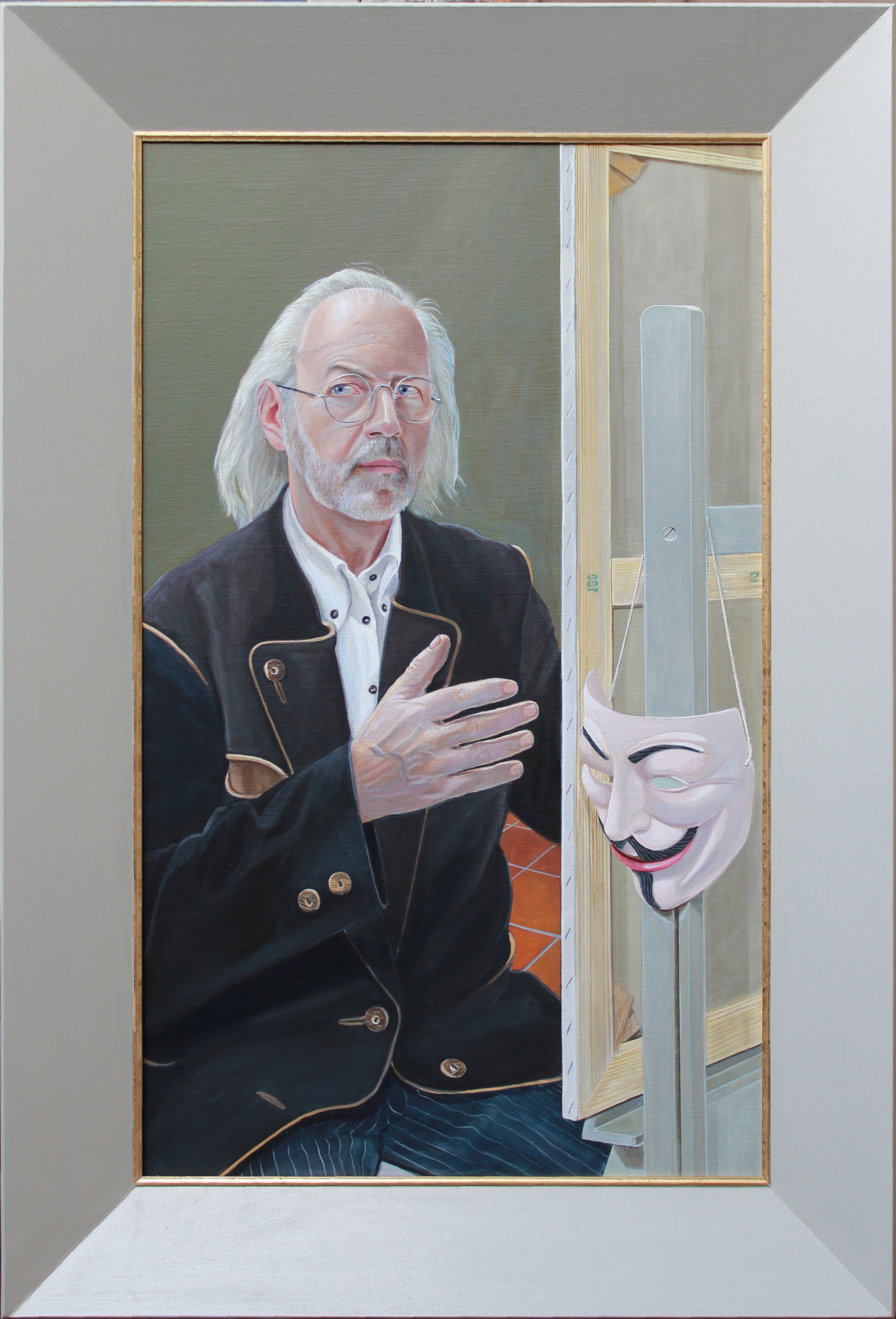 Der Maler Ulrich J. Sekinger. Selbstbildnis mit Guy Fawkes-Maske. 100 x 60 cm. Mai 2014 Wogegen protestiert dieser Maler? Er sitzt vor der Staffelei und arbeitet an eben diesem Bild. Doch im Augenblick hält er inne. Die schräg in den Vordergrund ragende hochformatige Keilrahmenrückseite verdeckt, was auf der Leinwand entsteht, ist aber wie eine Tür geöffnet, die im Zweidrittelspalt den Blick auf das Selbstbildnis des Malers freigibt, der gerade den Betrachter fixiert. Gestisch scheint er mit der Rechten ungebetene Gäste abzuwehren und nur willkommene herbeizubitten. Zugleich verweisen die gestreckten Finger – doppelt – auf das auf der Leinwand entstehende Bild, ein Abbild dieser Geste, wie auf die hinter dem Rahmen an der Staffelei hängende Maske. Will er mit der Blicköffnung die Ateliertür schließen und sich fortan dem Protest anschließen? Gründe gäbe es ästhetisch, sozial, politisch genug. Oder läuft die Entscheidung, weil der Maler ja bei der Arbeit ist, nicht in die andere Richtung? Hier sitze ich. Ich male.